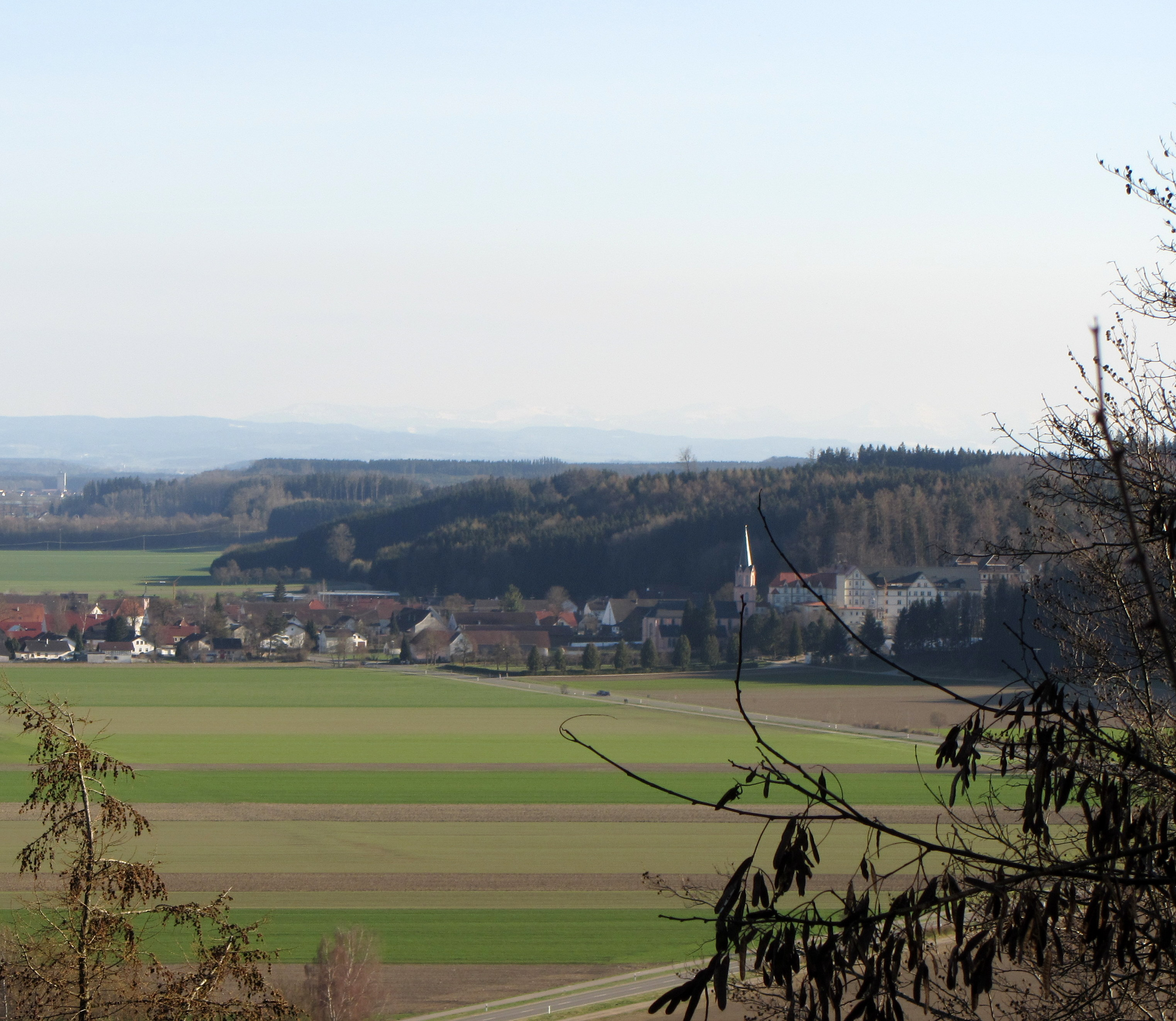 Aufnahmestandort Maria im Busch - Vorne rechts Bonlanden und das Kloster Bonlanden - links Lagerhaus Tannheim - Illertal. Die bewaldeten Höhen nennt man die Holzstöcke. Hintergrund Allgäuer Alpen.